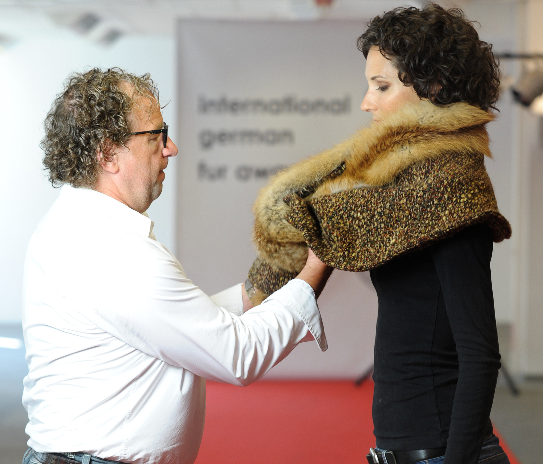 Schultertuch aus Rotfuchsfell und Boucléstoff. Entwurf und Ausführung: Renate Skoruppa, Poing, Deutschland . Anziehhilfe Kürschnermeister Hans-Peter Gerner. Im Rahmen des Internationalen Design-Wettbewerbs des Deutschen Kürschnerhandwerks wurde mit Unterstützung einer Jägerzeitung erstmals 2011 der Internationale Red Fox Germany Award vergeben, um die Nutzung des Rotfuchsfells zu fördern.